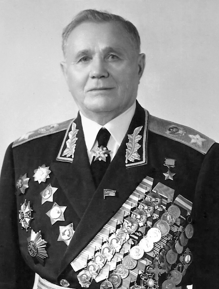 Маршал Советского Союза Герой Советского Союза Андрей Иванович Ерёменко